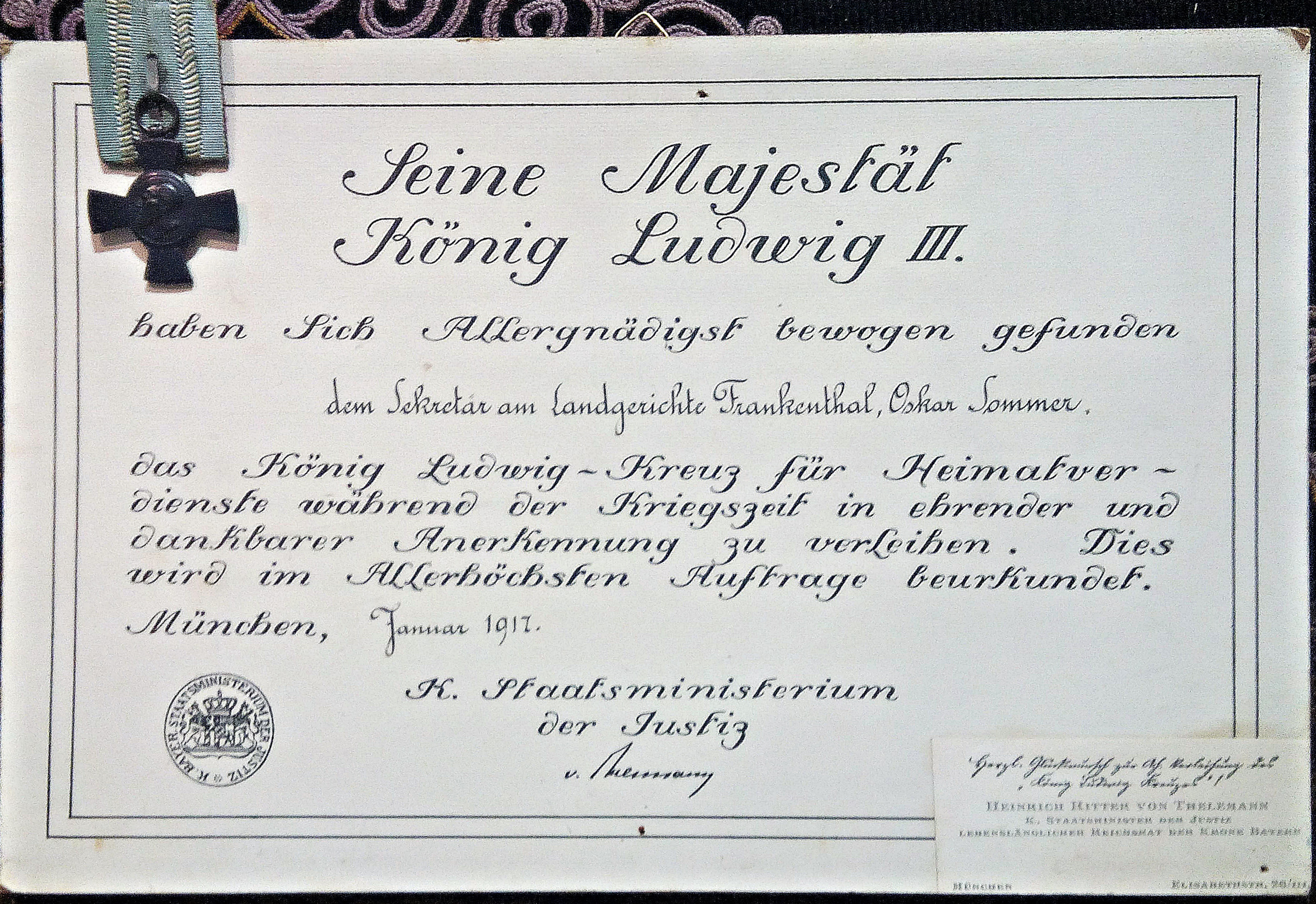 Urkunde König Ludwig Kreuz, 1917, Museum Grünstadt, Verleihung an Oskar Sommer aus dem Grünstadter Verlagshaus